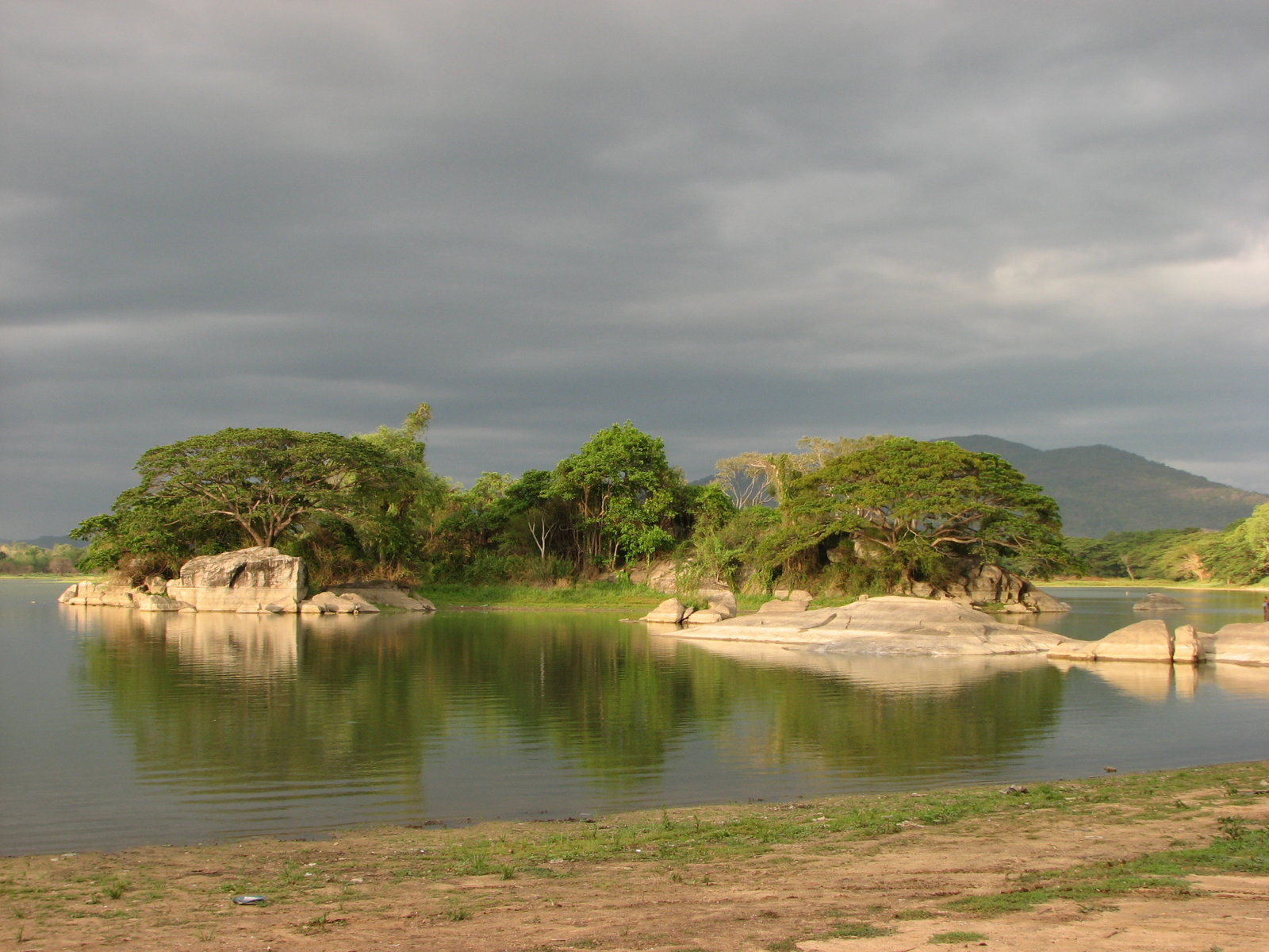 View of a lake at Yudanganawa in Buttala, Sri Lanka.